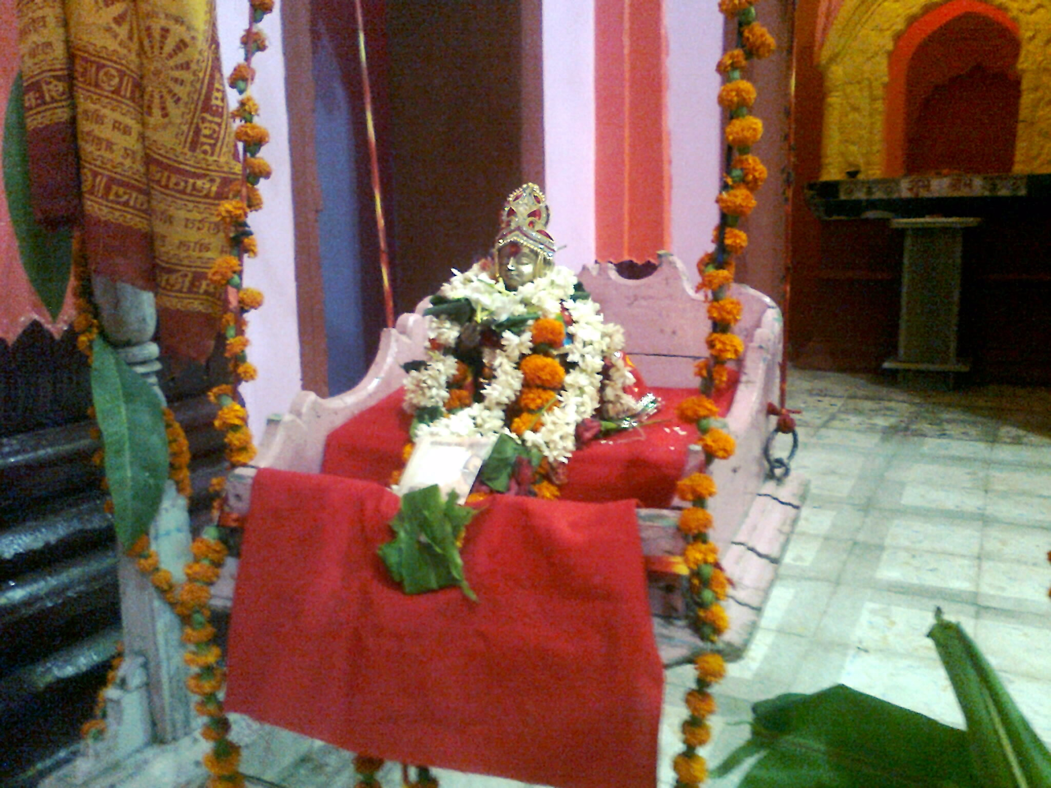 Rama Navami in Ram Mandir at Chinawal village, India